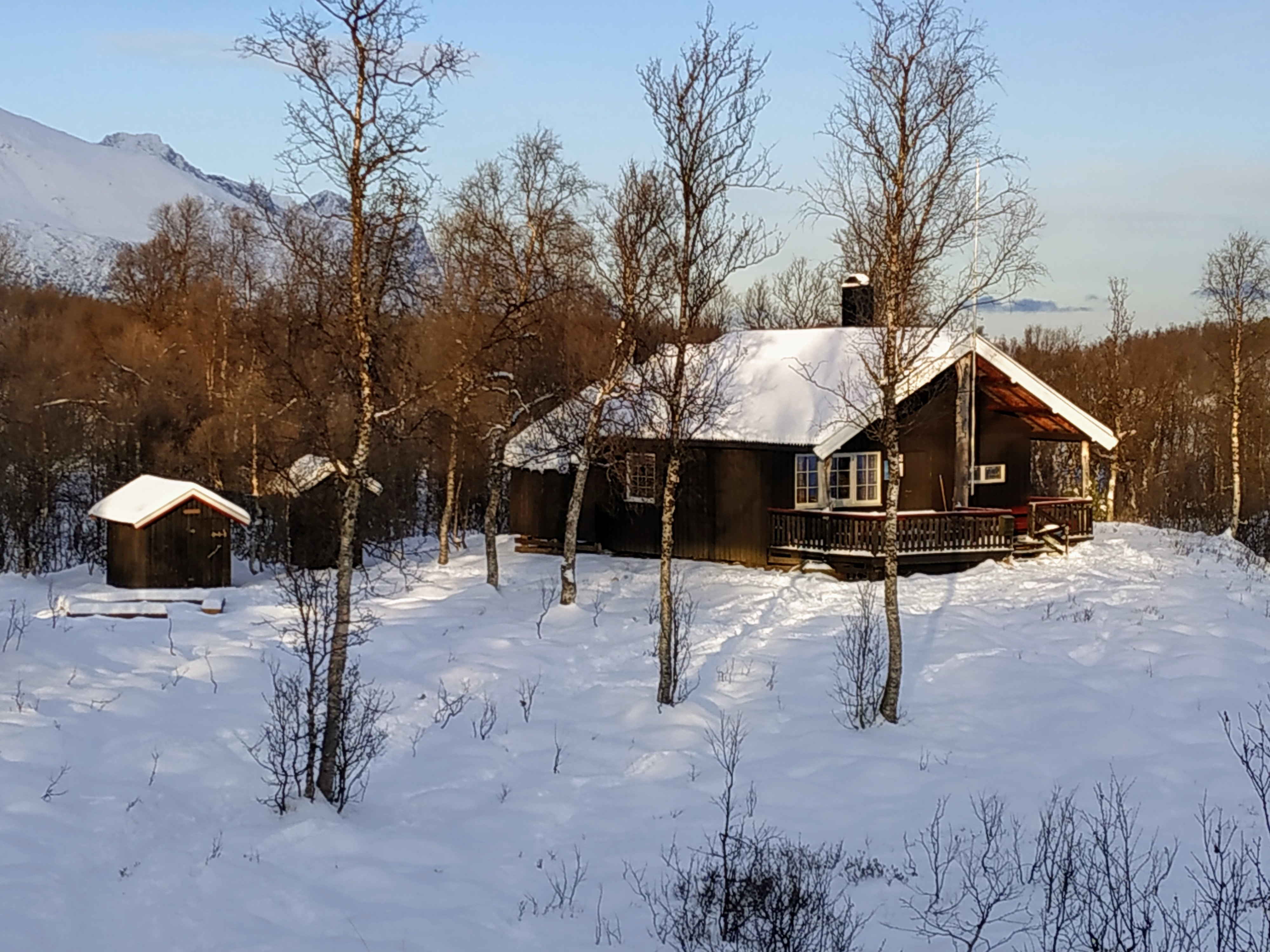 Vartohytta høsten 2019